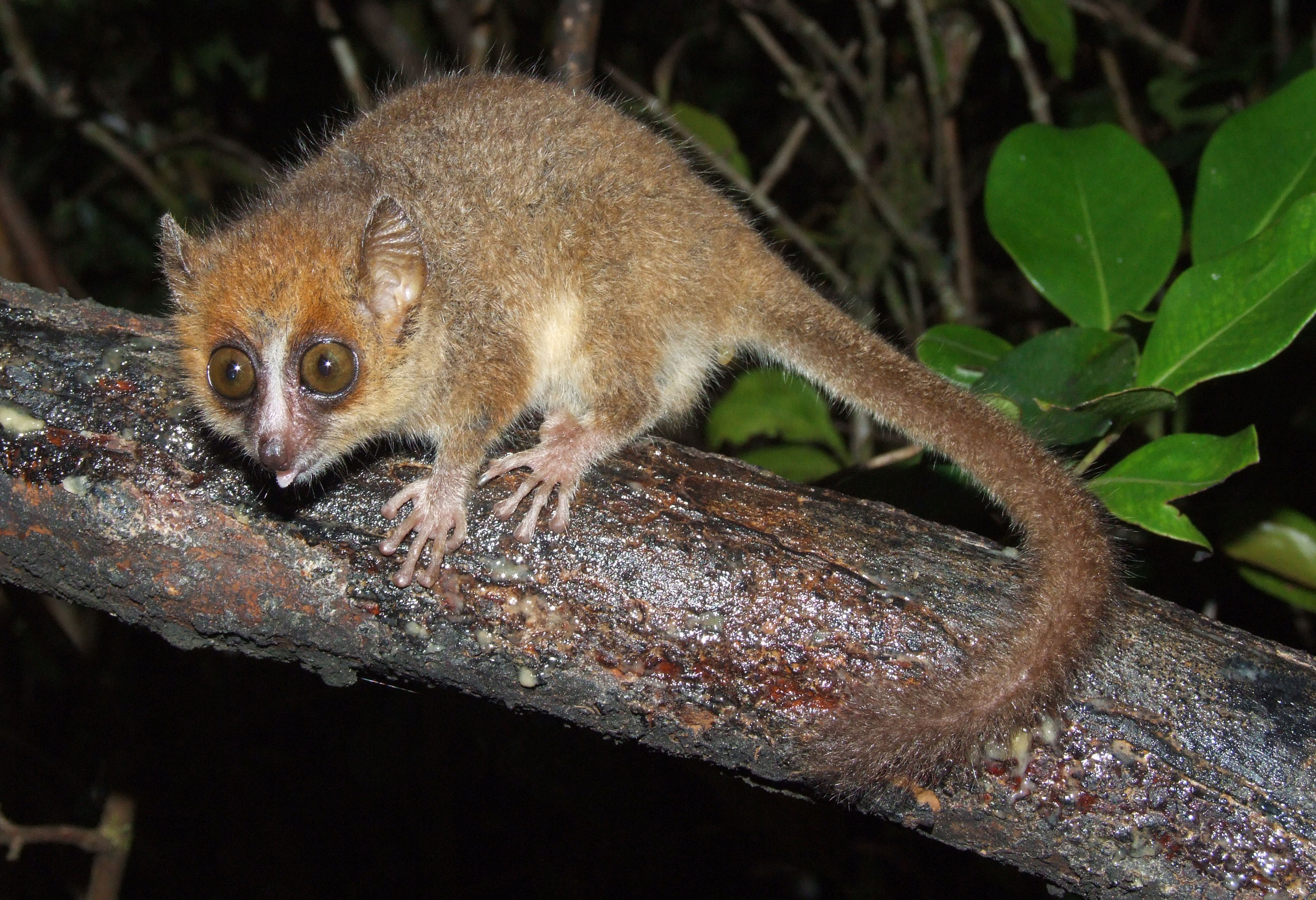 Zwerg-Mausmaki (Microcebus myoxinus)